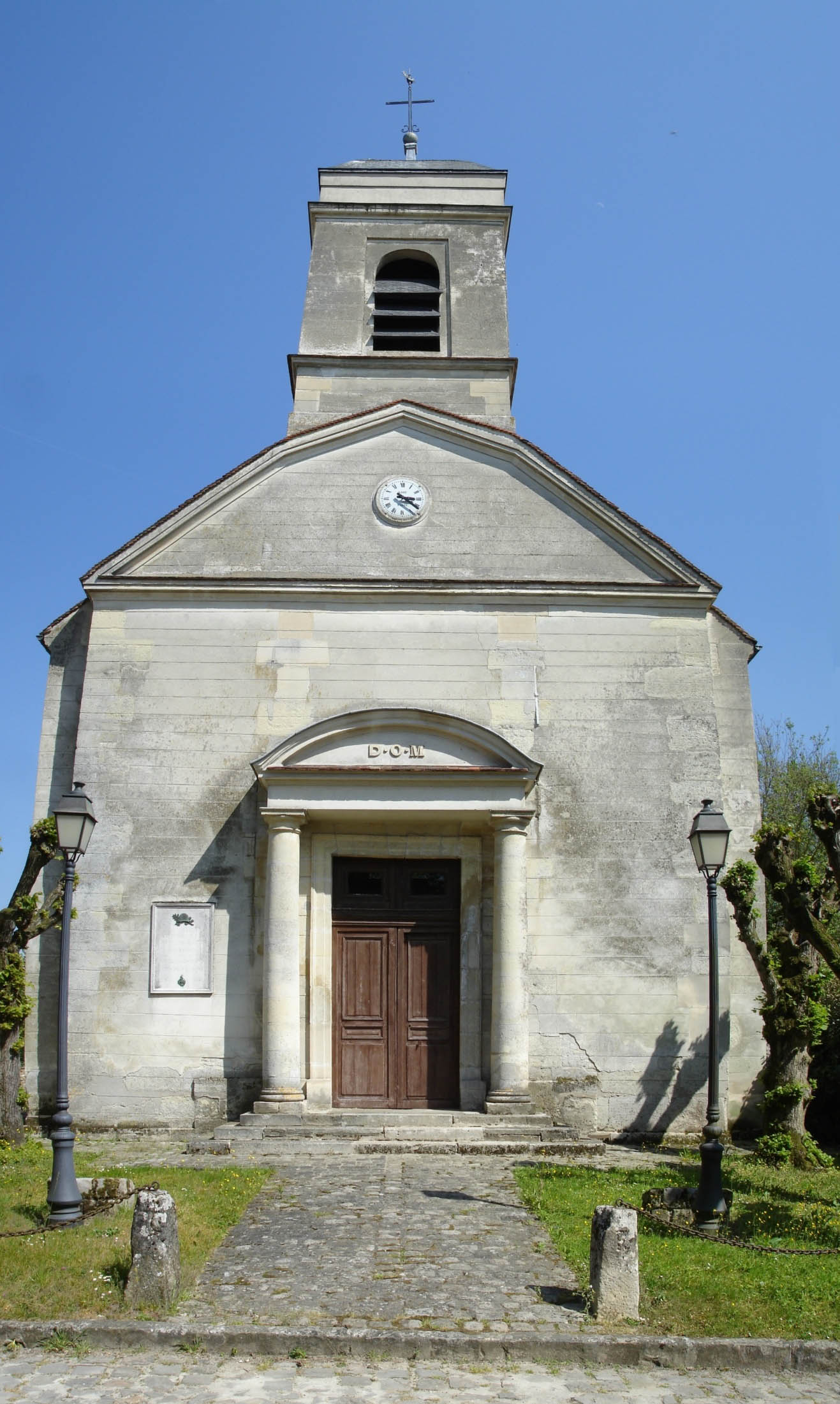 Façade de l'église de Châtenay-en-France (Val-d'Oise), France